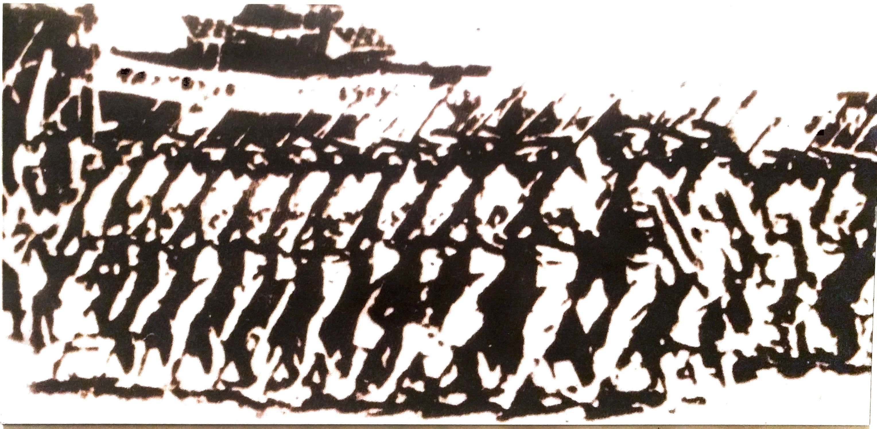 黄埔军校东征誓师